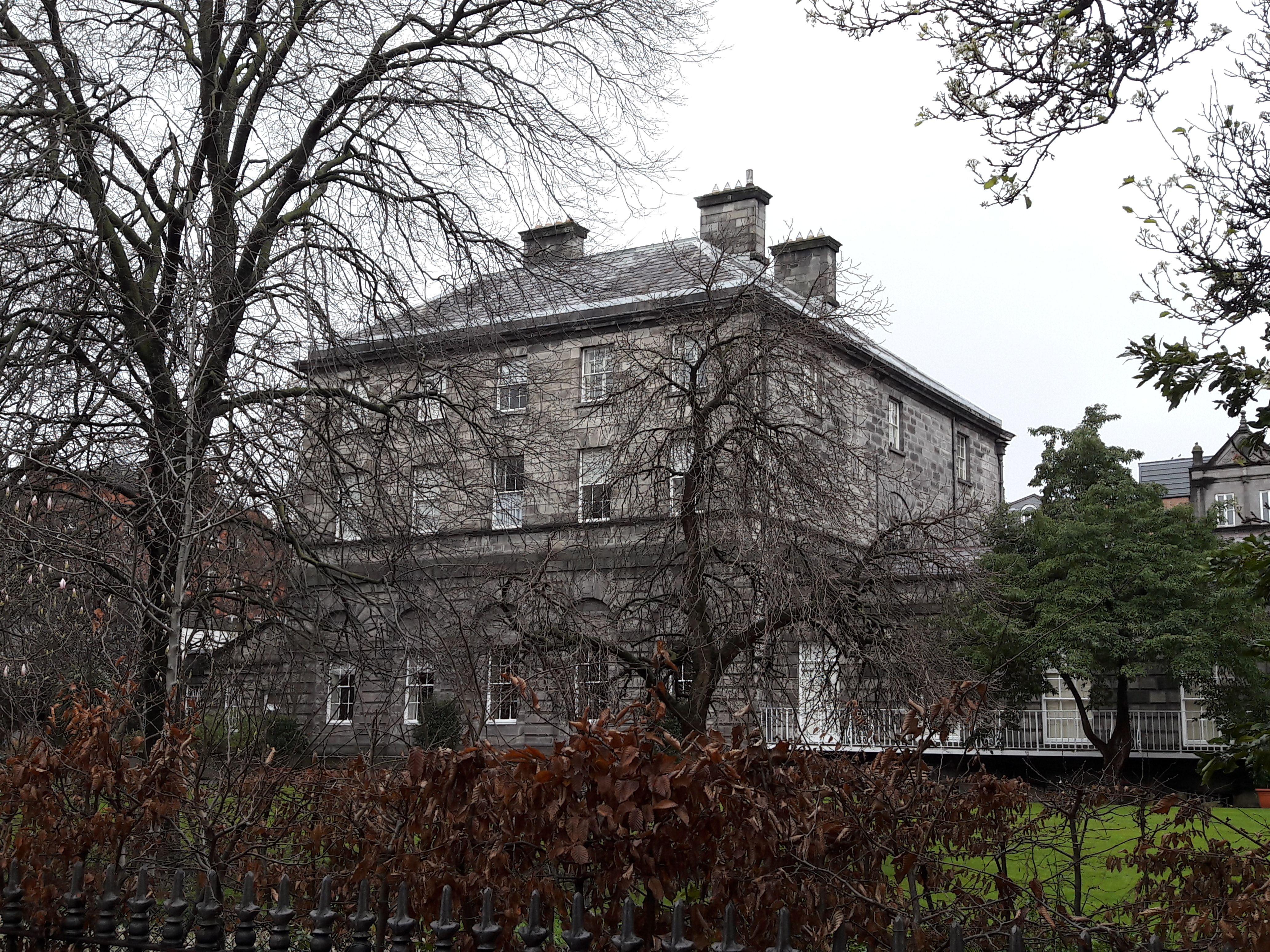 Provost's House